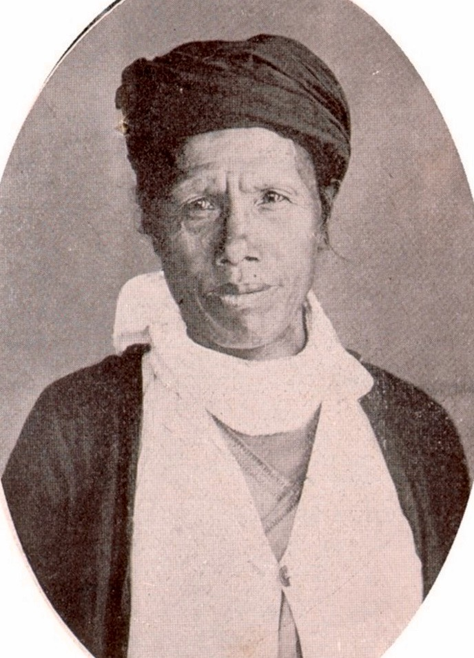 中文（台灣）: 引自鈴木秀夫編輯，1935，《臺灣蕃界展望》。臺北：理蕃之友。